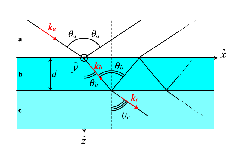 Schéma de réflexions multiples de la lumière pour illustrer l'article sur les coefficients de Fresnel.